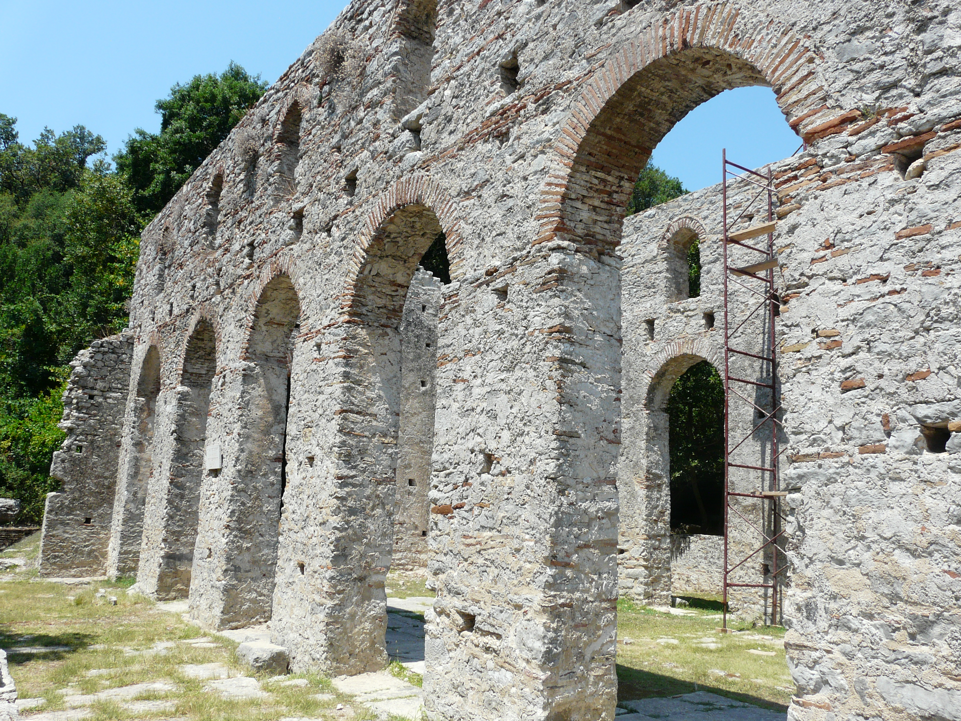 Butrint, basilica ruins